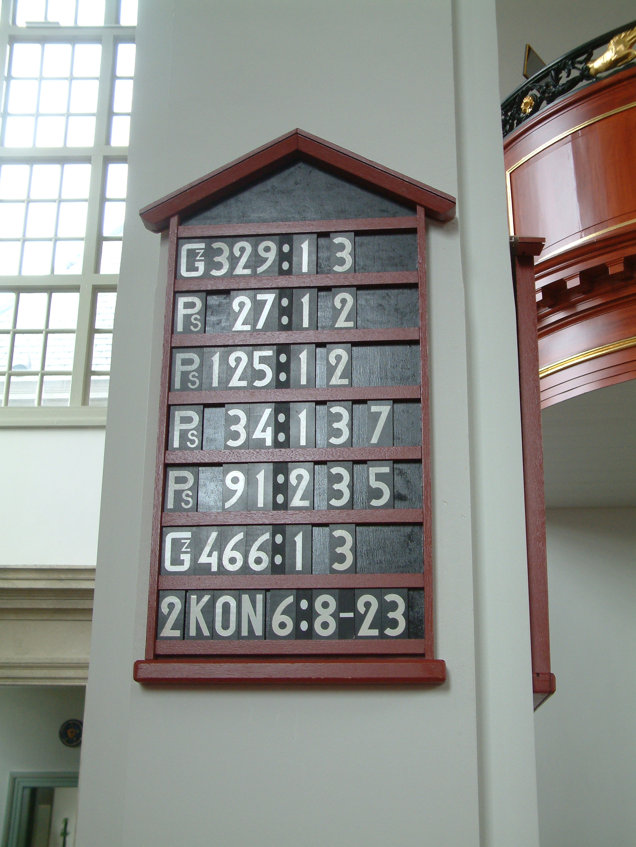 Oude kerk Zoetermeer